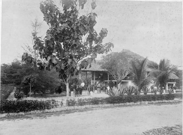 Foto. Het administrateurshuis van administrateur ter Beek van de tabaksonderneming Toempatan van de Medan Tabaksmaatschappij, Oost-Sumatra.